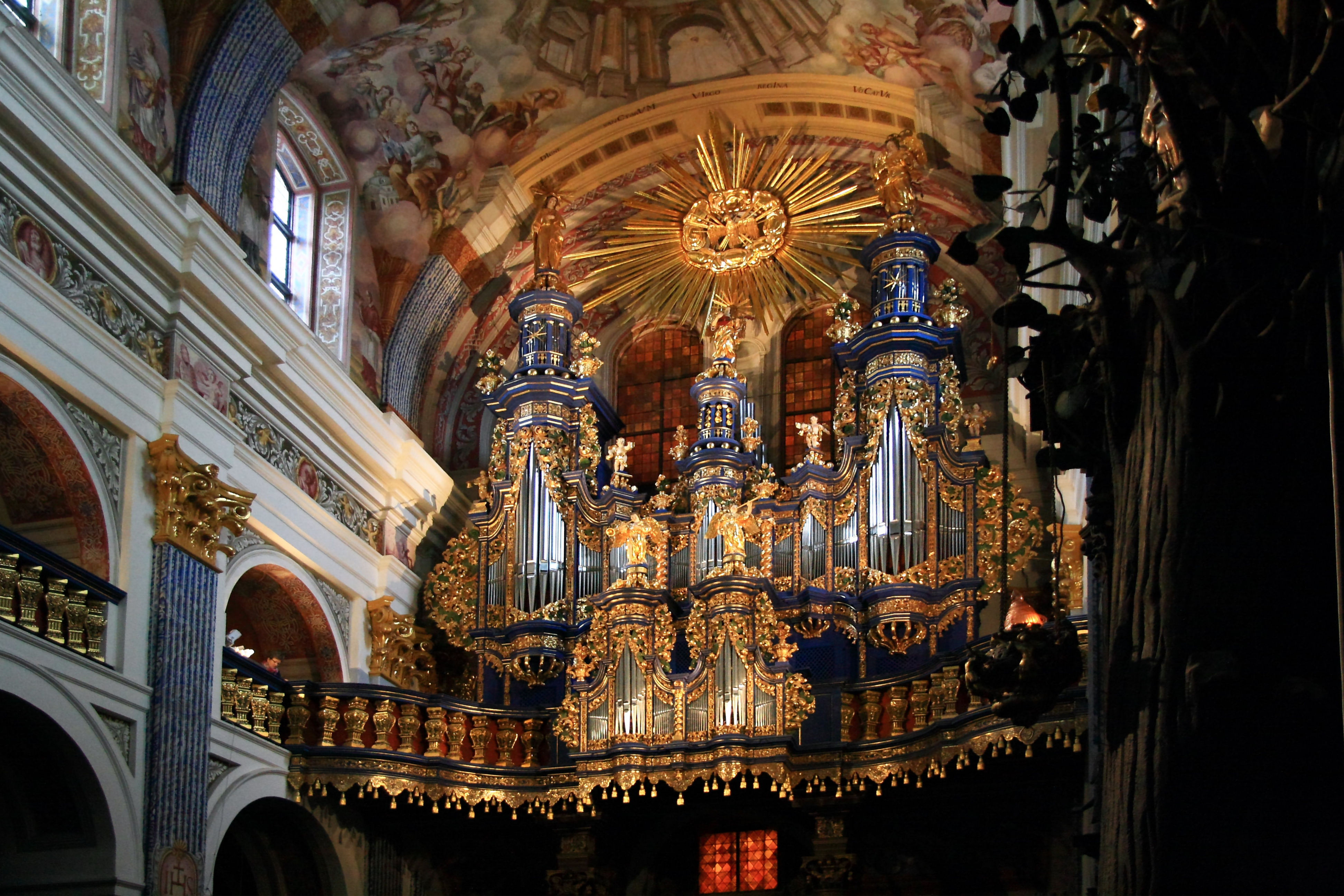 Orgel in Heilige Linde.